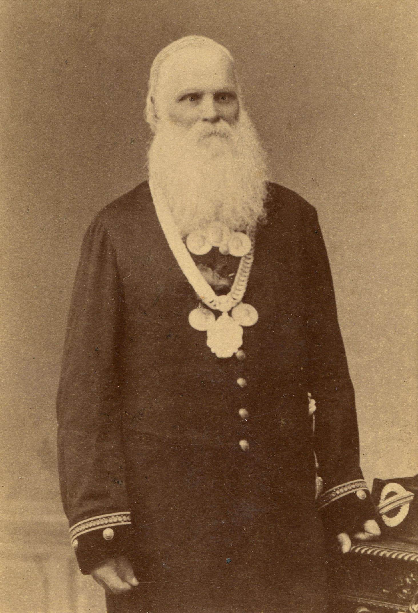 Фотоателье Н.Сажина в Муроме. Портрет муромского городского головы в 1888-1892 гг. Василия Михайловича Русакова. Место хранения: Муромский музей